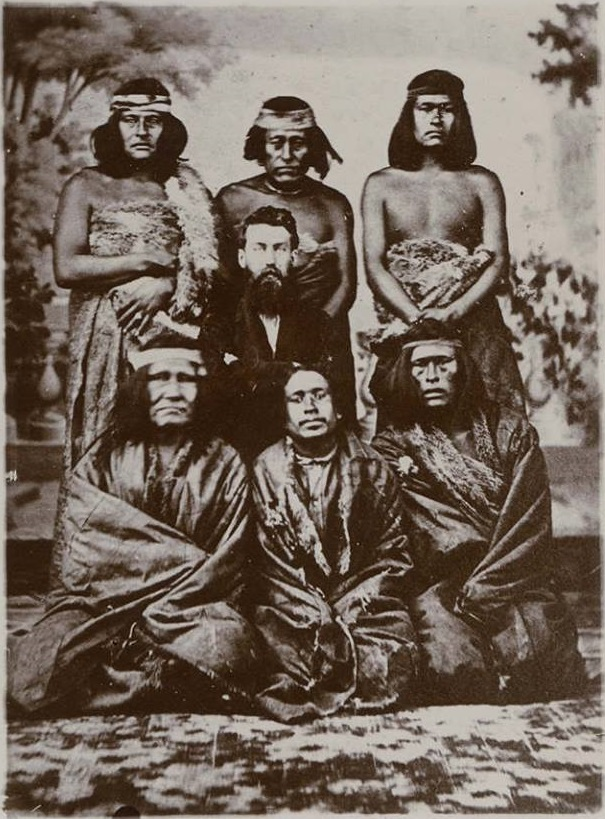 Lewis Jones junto con seis aborígenes (Tehuelches y/o Mapuches) de Chubut que lo acompañaron en un viaje a Buenos Aires, capital de Argentina, foto tomada en Buenos Aires.